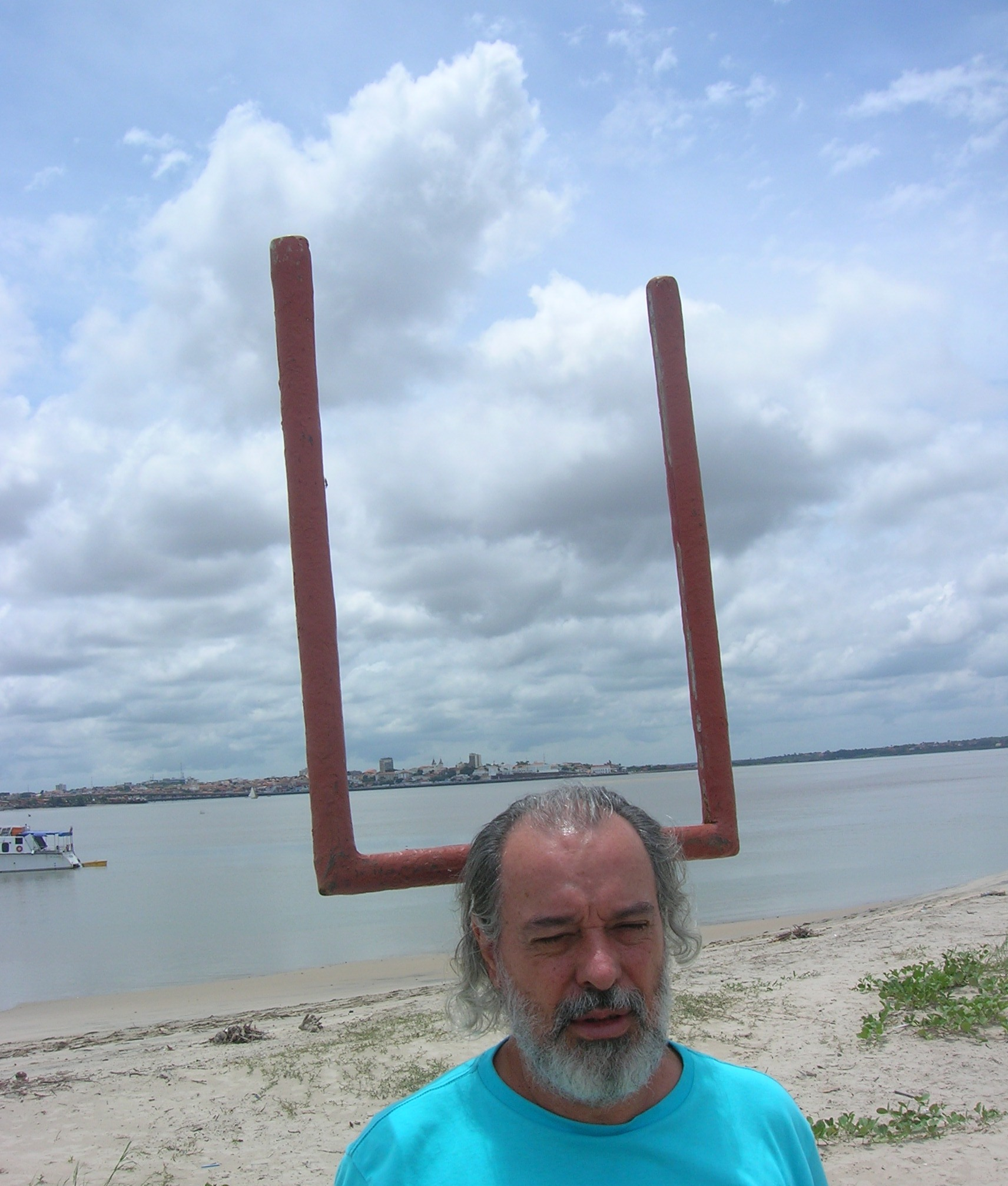 O poeta Carlos Lima em São Luís do Maranhão, Brasil. Carlos Lima é um dos expoentes da Geração de 70 da Poesia Brasileira e é também professor da Universidade Estadual do Rio de Janeiro.